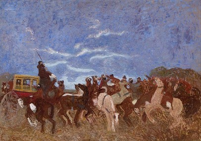 Muerte de Facundo Quiroga. Óleo sobre cartón de Pedro Figari